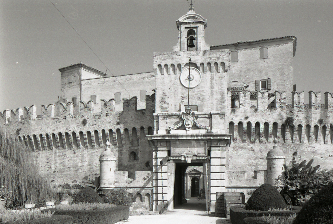 Servizio fotografico : Falconara Marittima, 1969 / Paolo Monti. - Strisce: 1, Fotogrammi complessivi: 5 : Negativo b/n, gelatina bromuro d'argento/ pellicola ; 35 mm. - ((I fotogrammi hanno una doppia numerazione. . - Sul portanegativi: Nikon FP4. - Sul dorso del portanegativi Monti specifica: "Marche.". - Occasione: Documentazione per la pubblicazione: "TOURING CLUB ITALIANO, Marche, Milano, TCI, 1971". - : TOURING CLUB ITALIANO, Marche, Milano, TCI, 1971 (1971). - Fonte: Agenda di Paolo Monti: Monti - Agenda 1969 (1969), presso Archivio Paolo Monti. - Fonte: Agenda di Paolo Monti: Monti/ 3 aprile 1966 - 9 marzo 1971/ 12421-16823 (1966-1971), presso Archivio Paolo Monti. - Fonte: Monografia